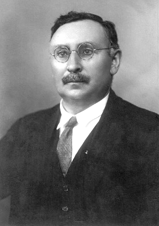 Eloy Luis André, 1876 - 1935